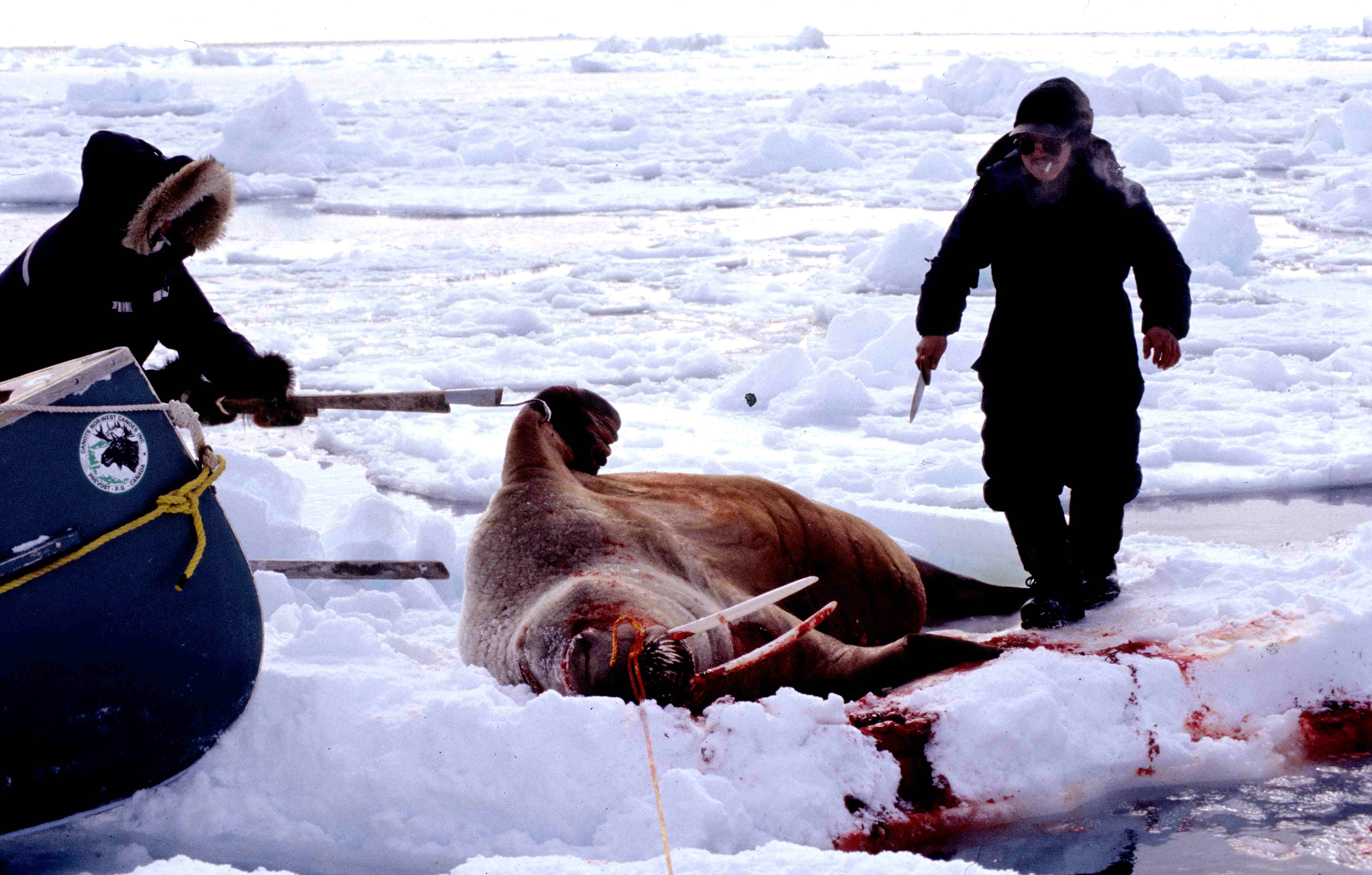 Walrus hunting